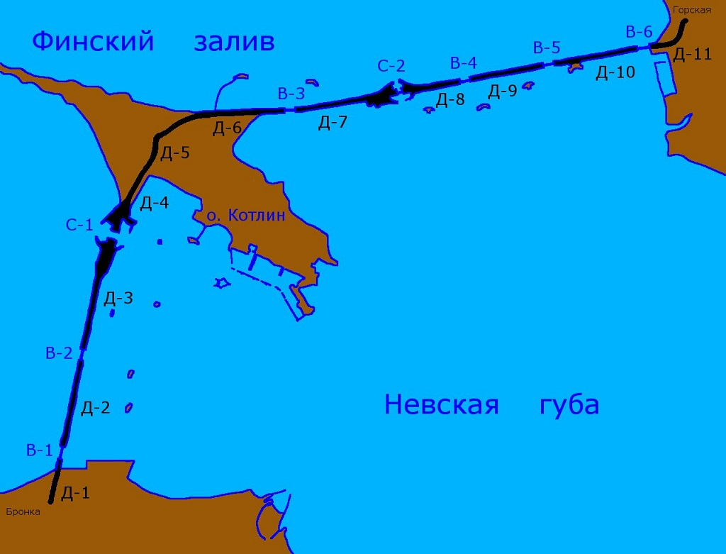 Схема комплекса защитных сооружений Санкт-Петербурга от наводнений. Состояние местности на 2017 год.